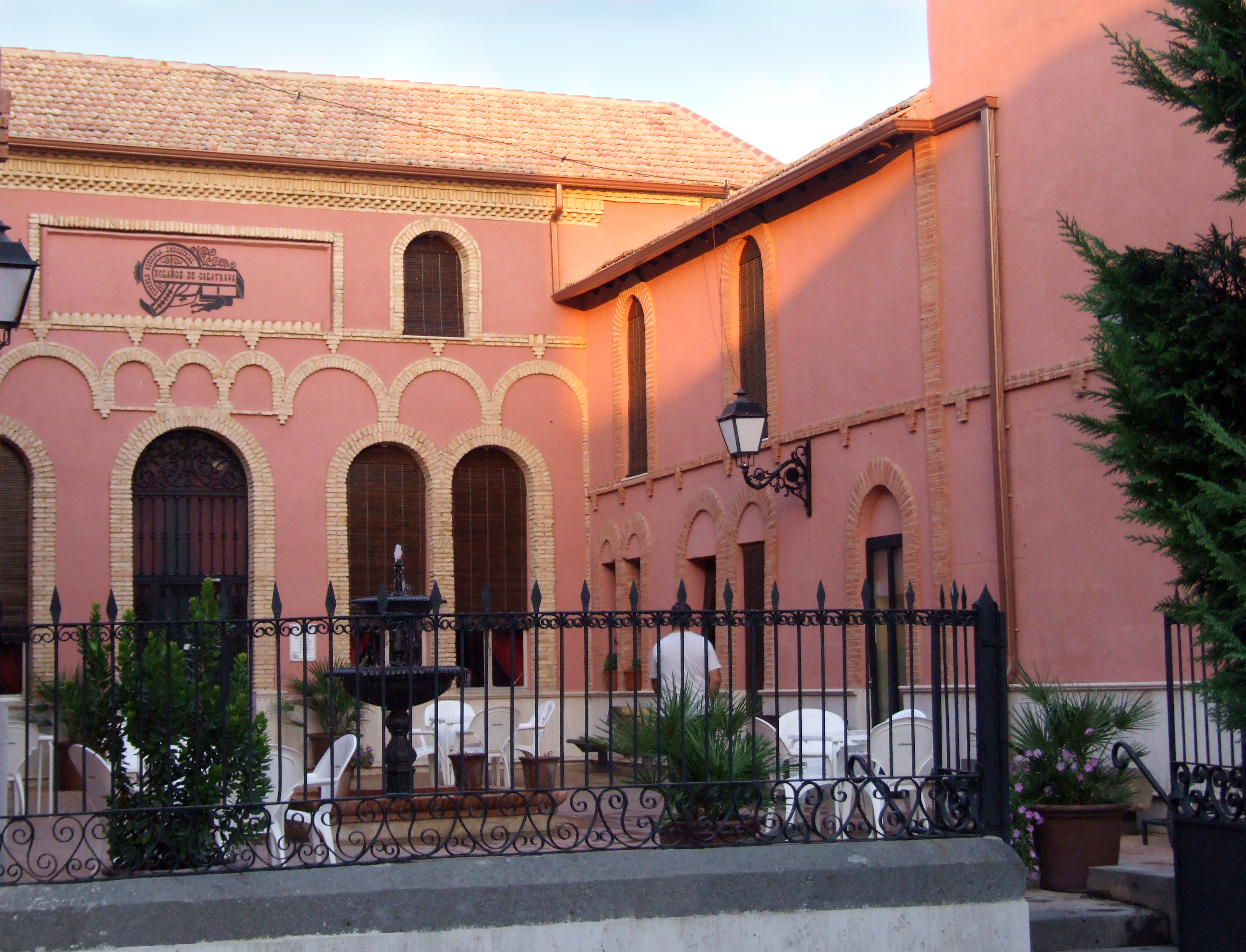 El Círculo Agrícola Industrial (popularmente conocido como el casino de la verja)en la céntrica calle Príncipe de Asturias